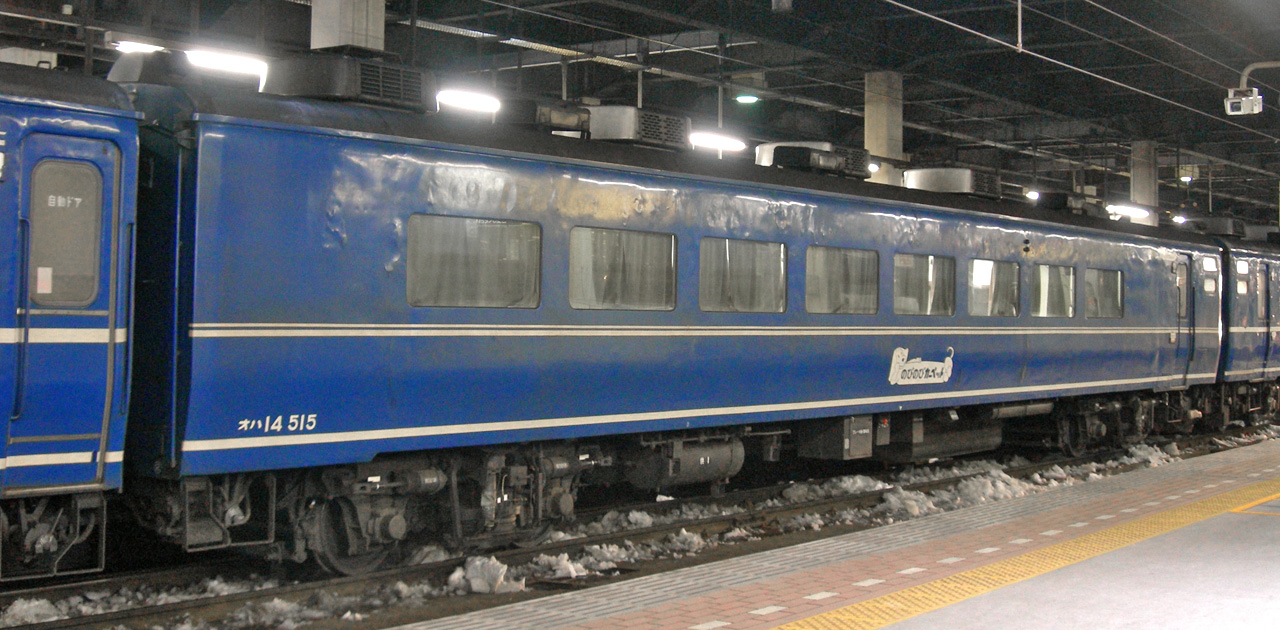 オハ14－515